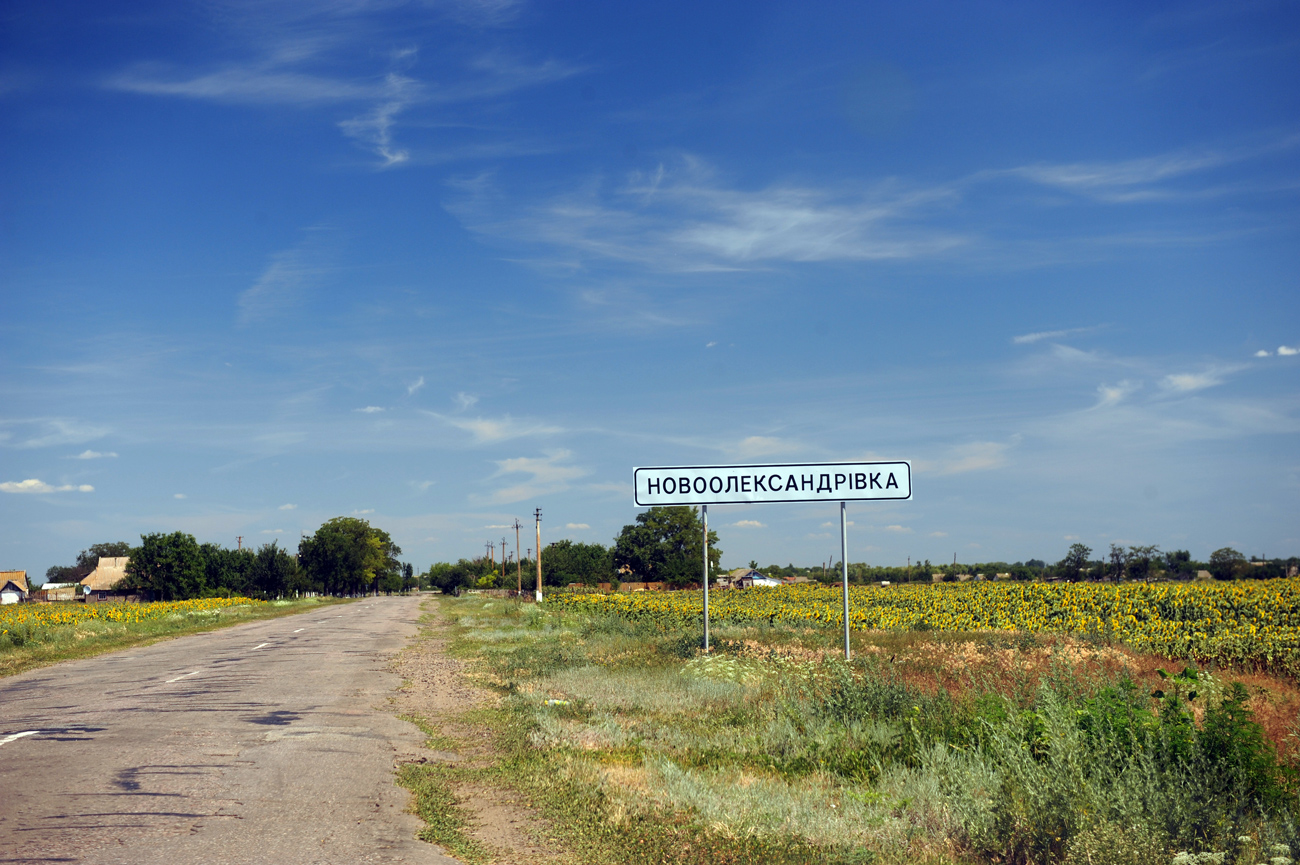 Новоалександровка